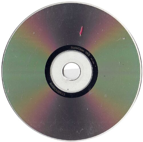 Чистящий компакт диск. Сверху от отверстия видна щёточка, которая чистит лазерный сенсор